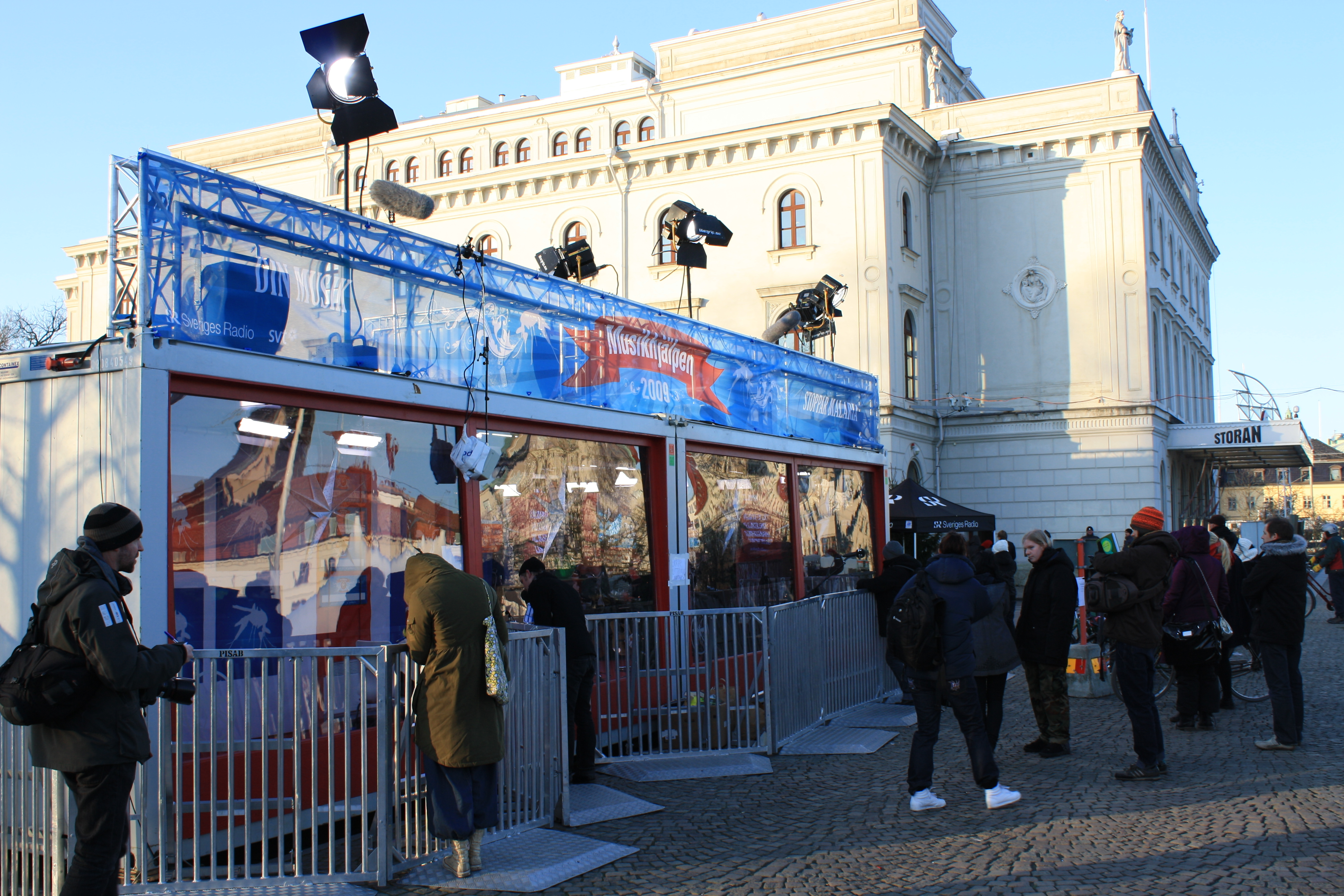 Musikhjälpenhuset 2009 i Göteborg